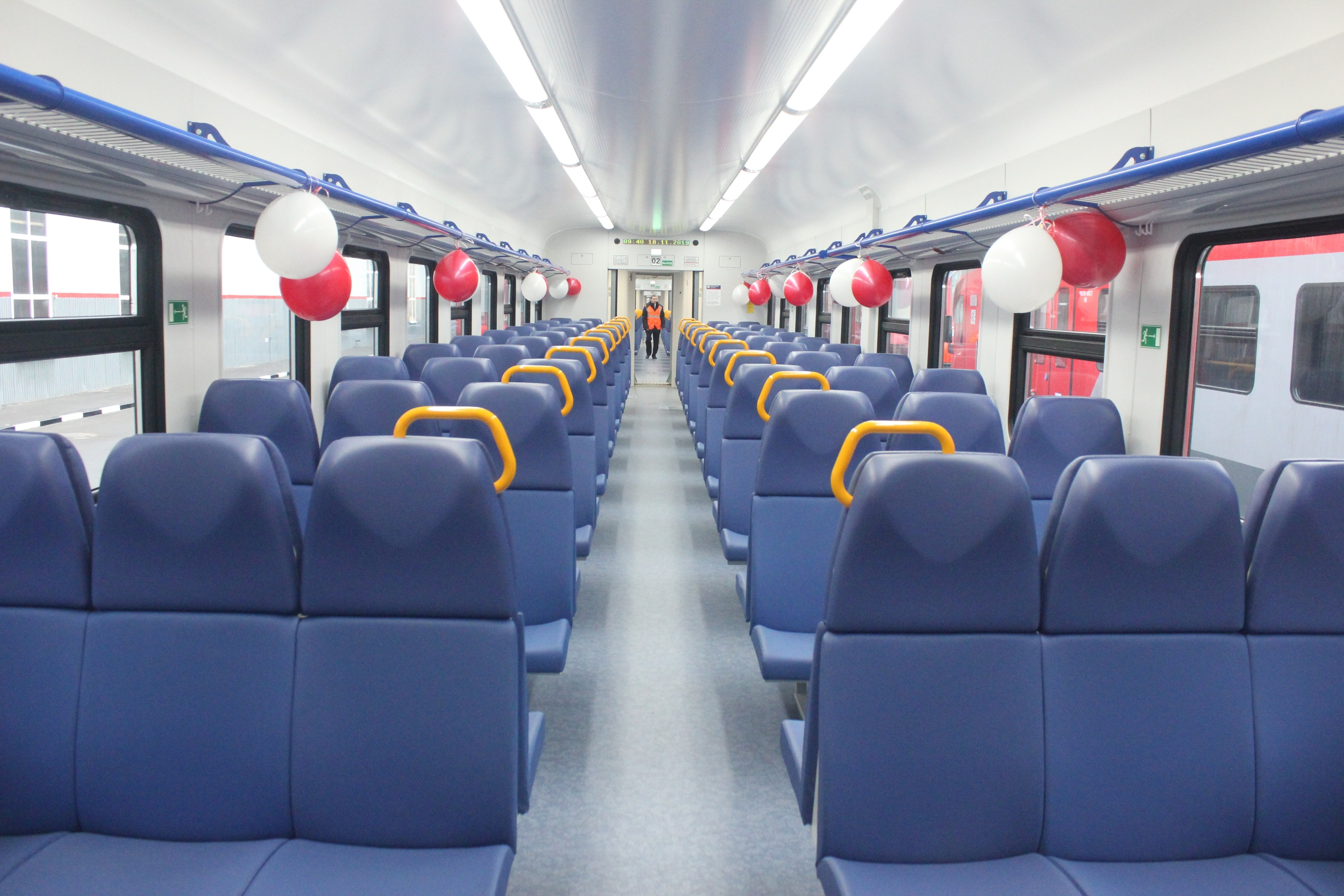 Электропоезд изнутри